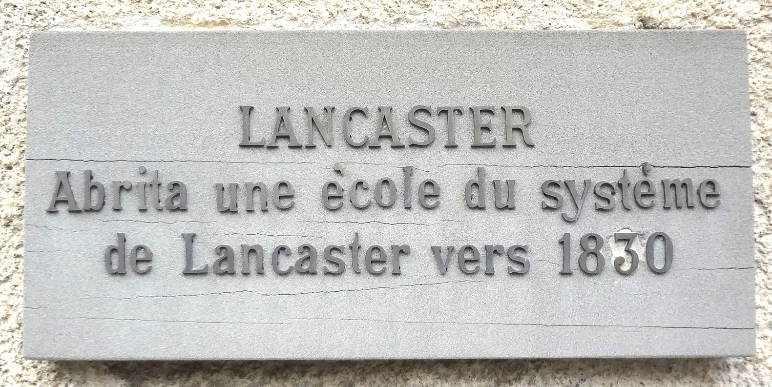 Mairie de Nyon. Ancienne "Ecole Lancaster". Plaque sur la façade.